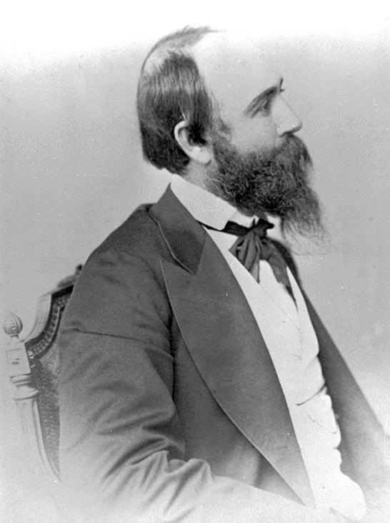 Manuel Antonio Matta Goyenechea (*Copiapó, 27 de febrero de 1826 - † Santiago de Chile, 12 de junio de 1892), político, abogado y escritor Chileno fundador del Partido Radical de Chile junto con Pedro León Gallo.